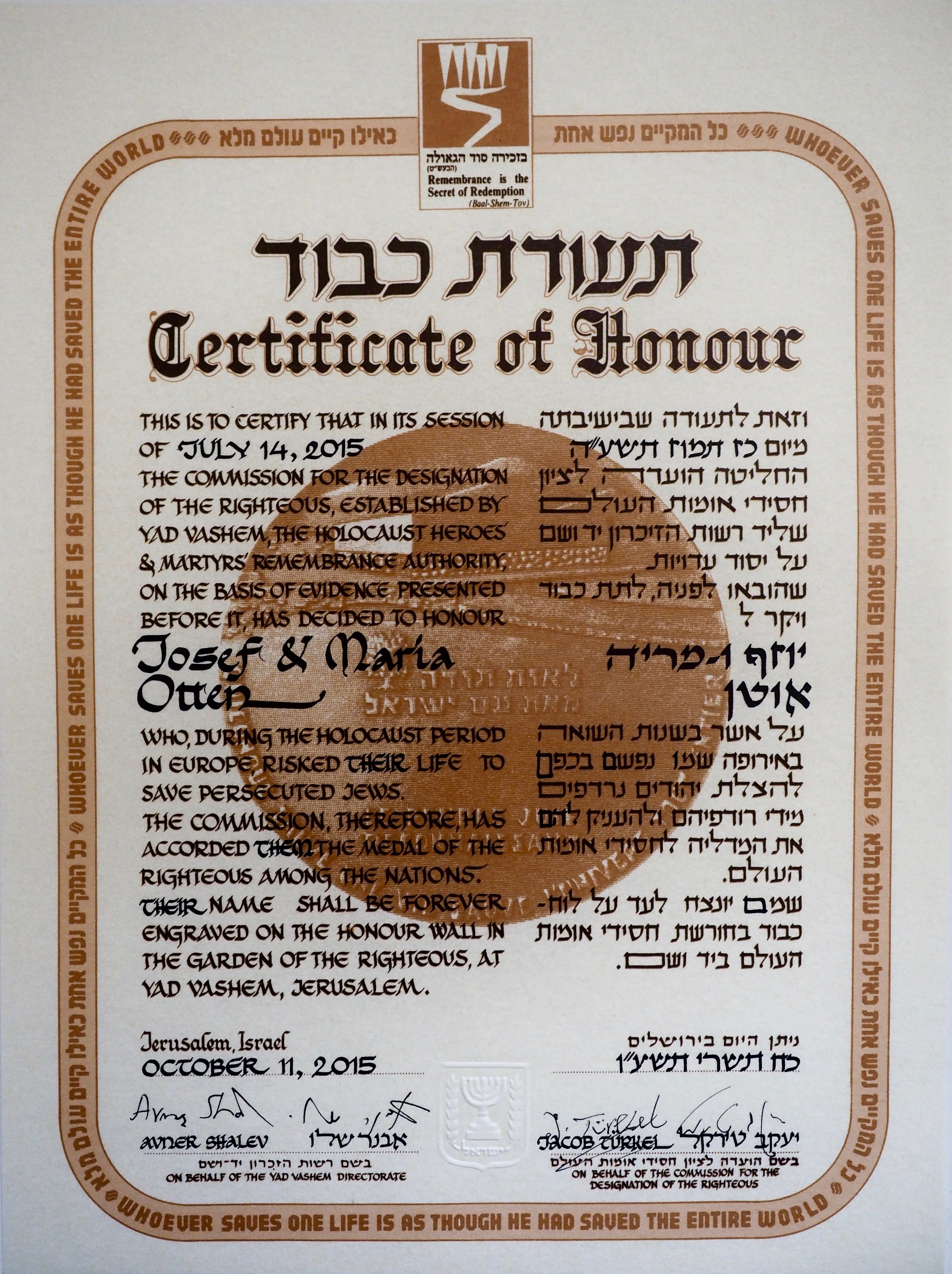 Am 14. Mai 2018 hat der Botschafter des Staates Israel, S.E. Jeremy Issacharoff, das Düsseldorfer Ehepaar Maria und Josef Otten posthum mit dem Titel "Gerechte unter den Völkern" geehrt und die Ehrenurkunde an den Enkelsohn Günther Otten übergeben.